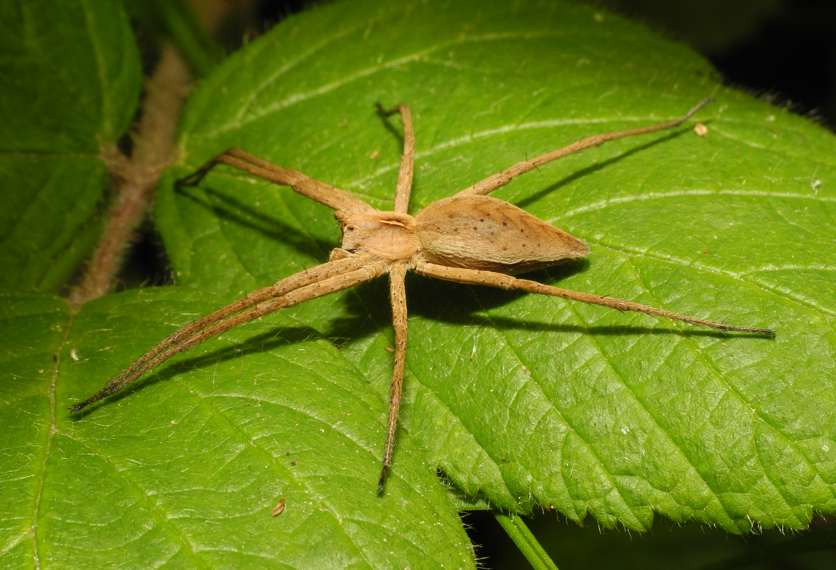 Araignée (Pisaura mirabilis). Image prise avec la bonnette Raynox DCR-250.